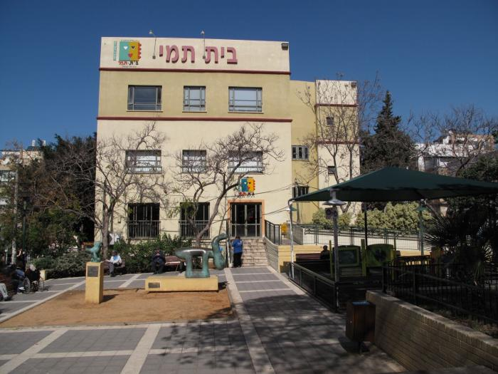 בית תמי. מרכז קהילתי בשנקין